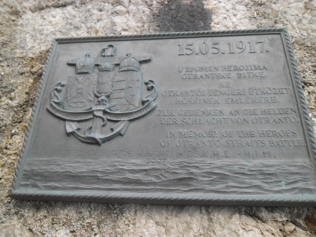 spomenik u utvrdi na poluotoku Prevlaci